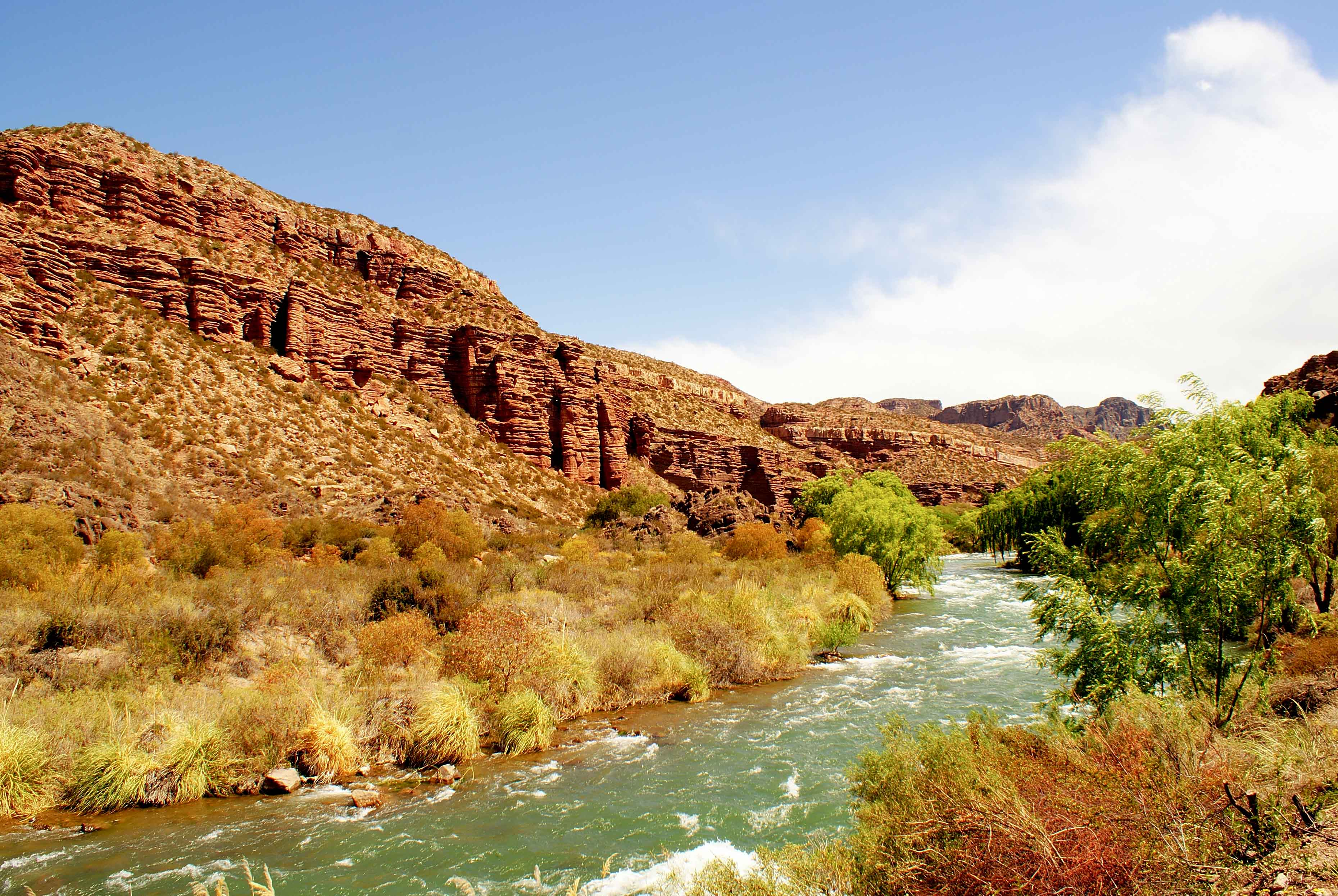 Vista del rio y la vegetación en Valle Grande